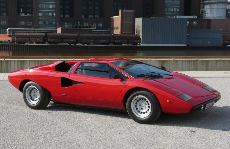 Lamborghini Countach LP400 in der Autostadt Wolfsburg